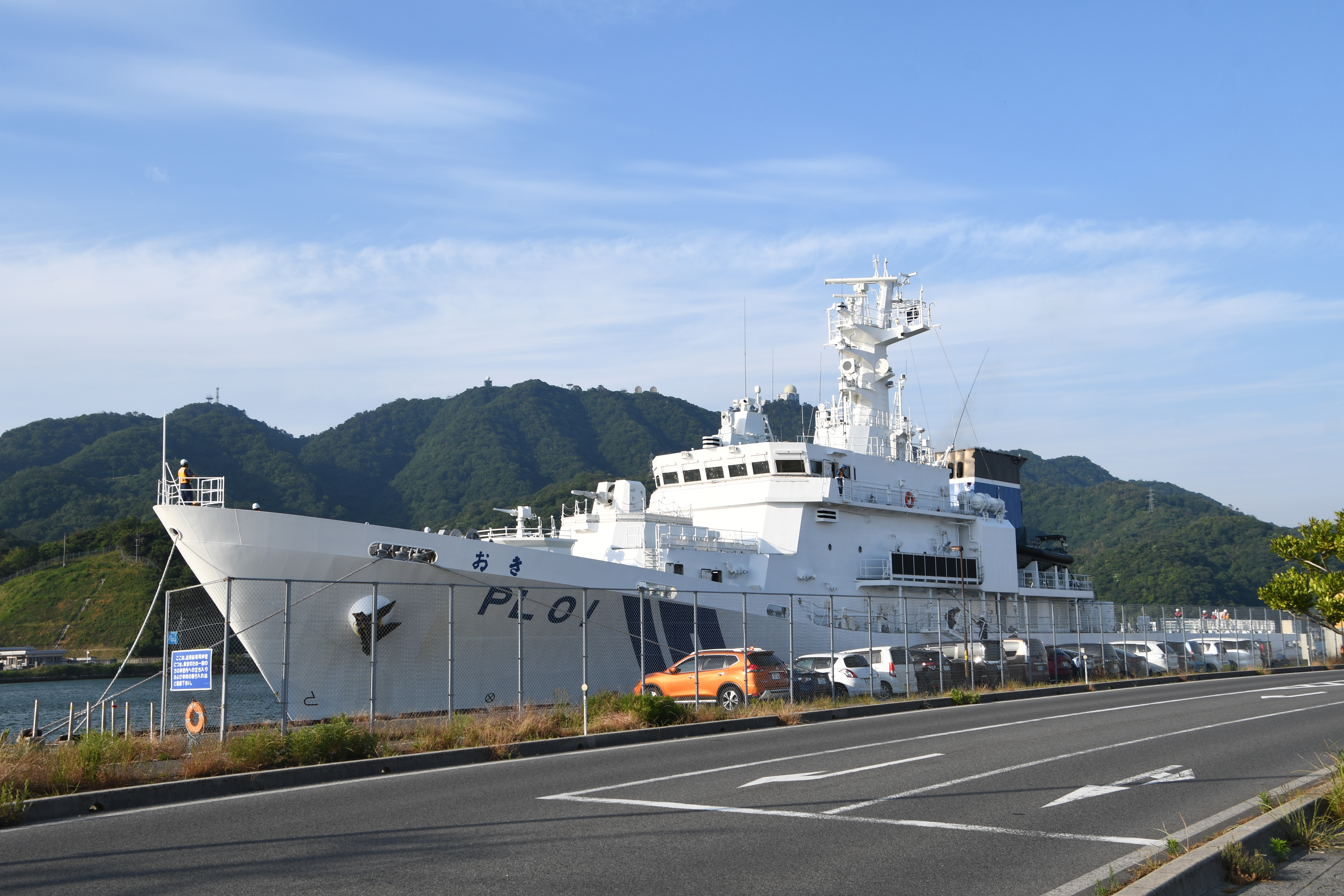 海上保安庁 1,000トン型巡視船おき（PL-01） 左舷前面。2019年6月1日 境港にて。 Nikon D7500